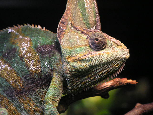 Chameleon in Apenheul Zoo, Netherlandschameleon